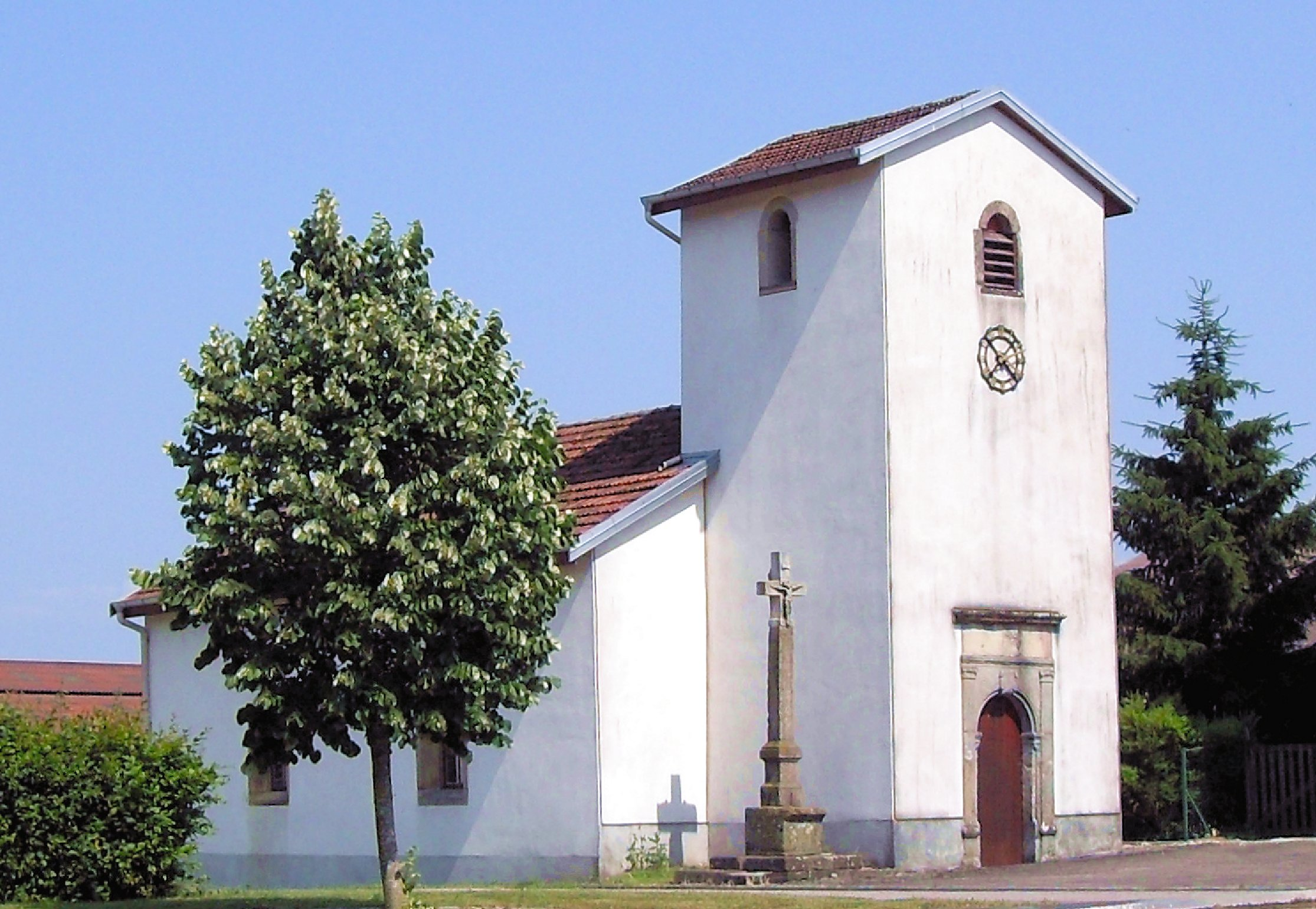 La chapelle de Hardancourt